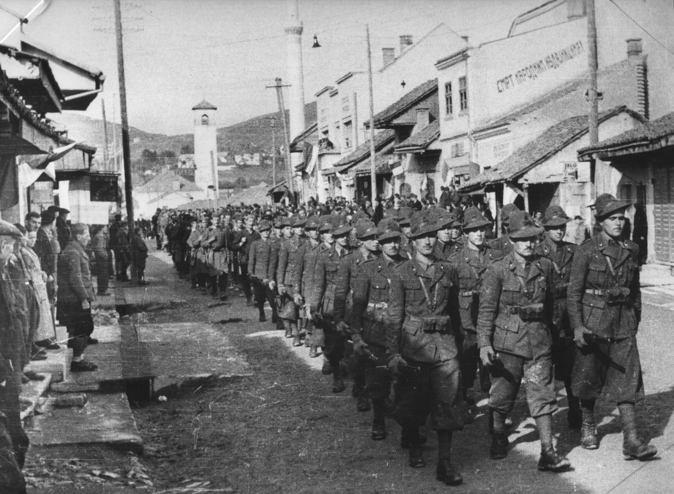 Srpskohrvatski / српскохрватски: Italijanska partizanska brigada Garibaldi defiluje Pljevljima na godišnjicu oktobarske revolucije 1943.